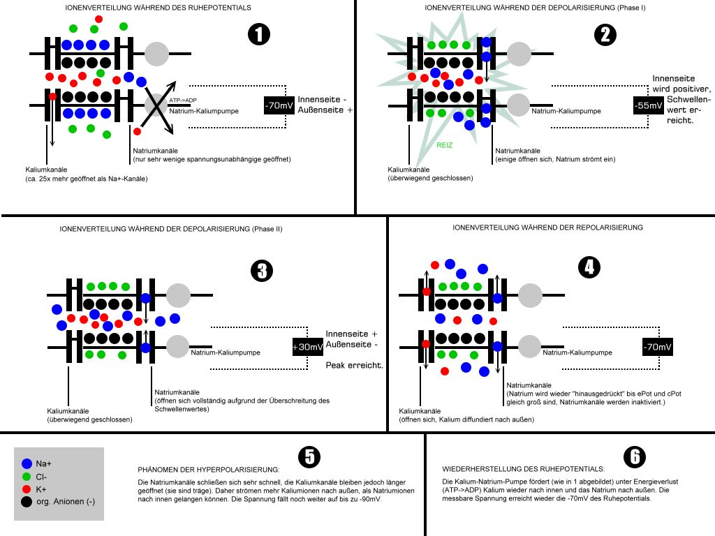 Aktionspotential innerhalb eines Neurons - Ionenverteilung